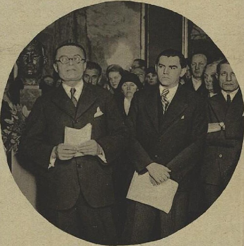 Kamil Novotný (1892-1959), český historik umění, výtvarný kritik, spisovatel publikací o umění, redaktor a ministerský úředník